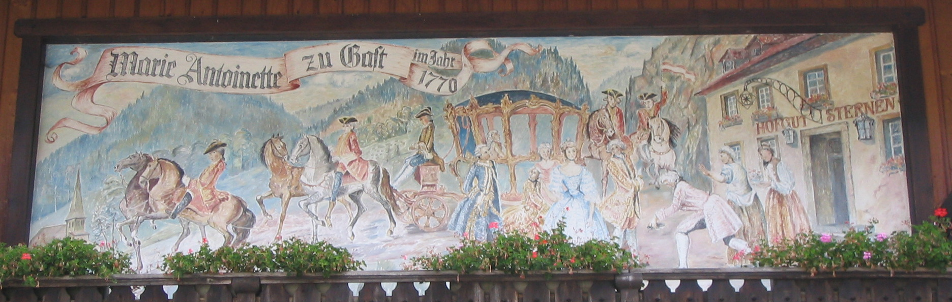 Gemälde am Hofgut Sternen, das von der Durchreise von Marie Antoinette im Jahr 1770 berichtet